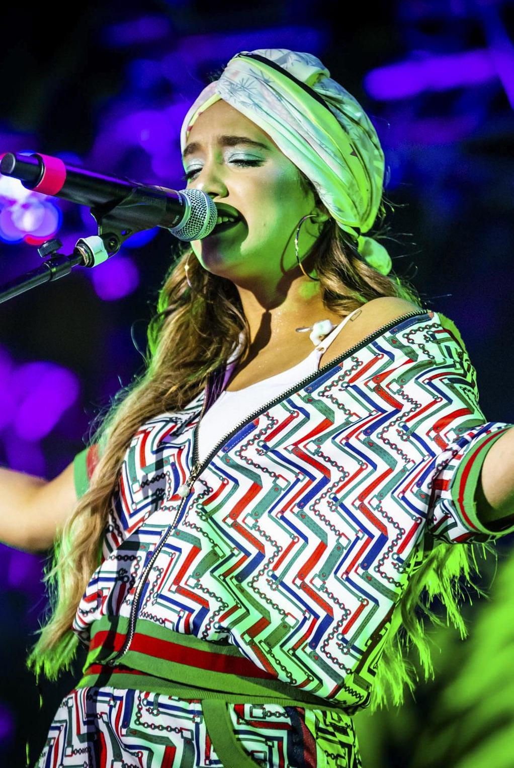 Ángela Torres cantando el tema "Ahora te puedes marchar" de Luis Miguel en el Festival Ciudad Emergente como parte del show "Solamente una vez"